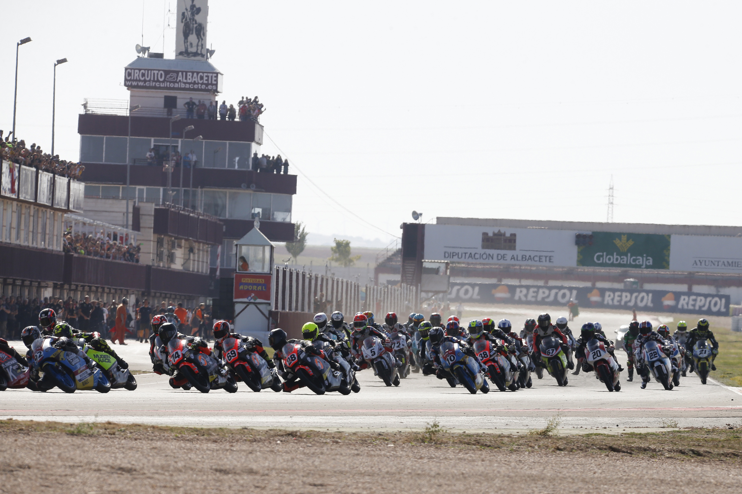 ETC. FIM CEV Repsol Albacete 2019